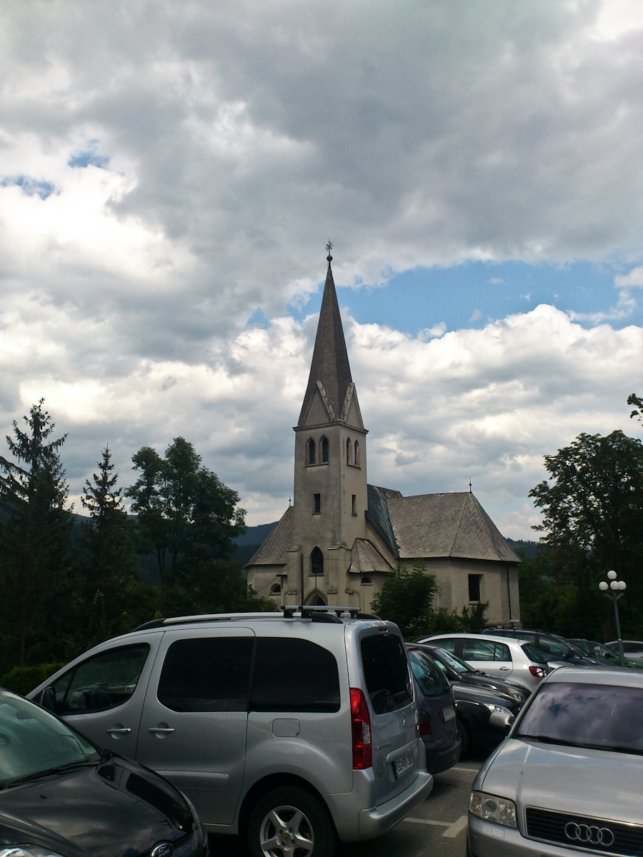 Prevalje